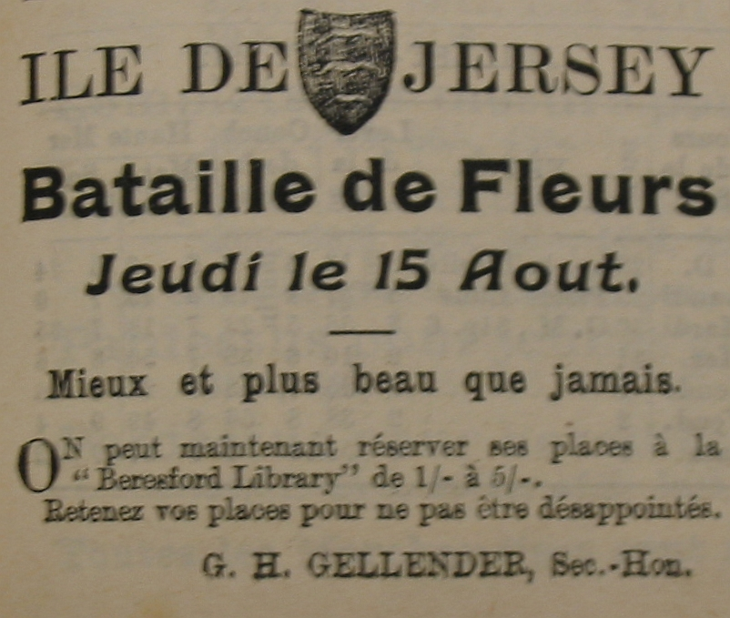 Nrf: D'la Vielle Chronique, Jèrri